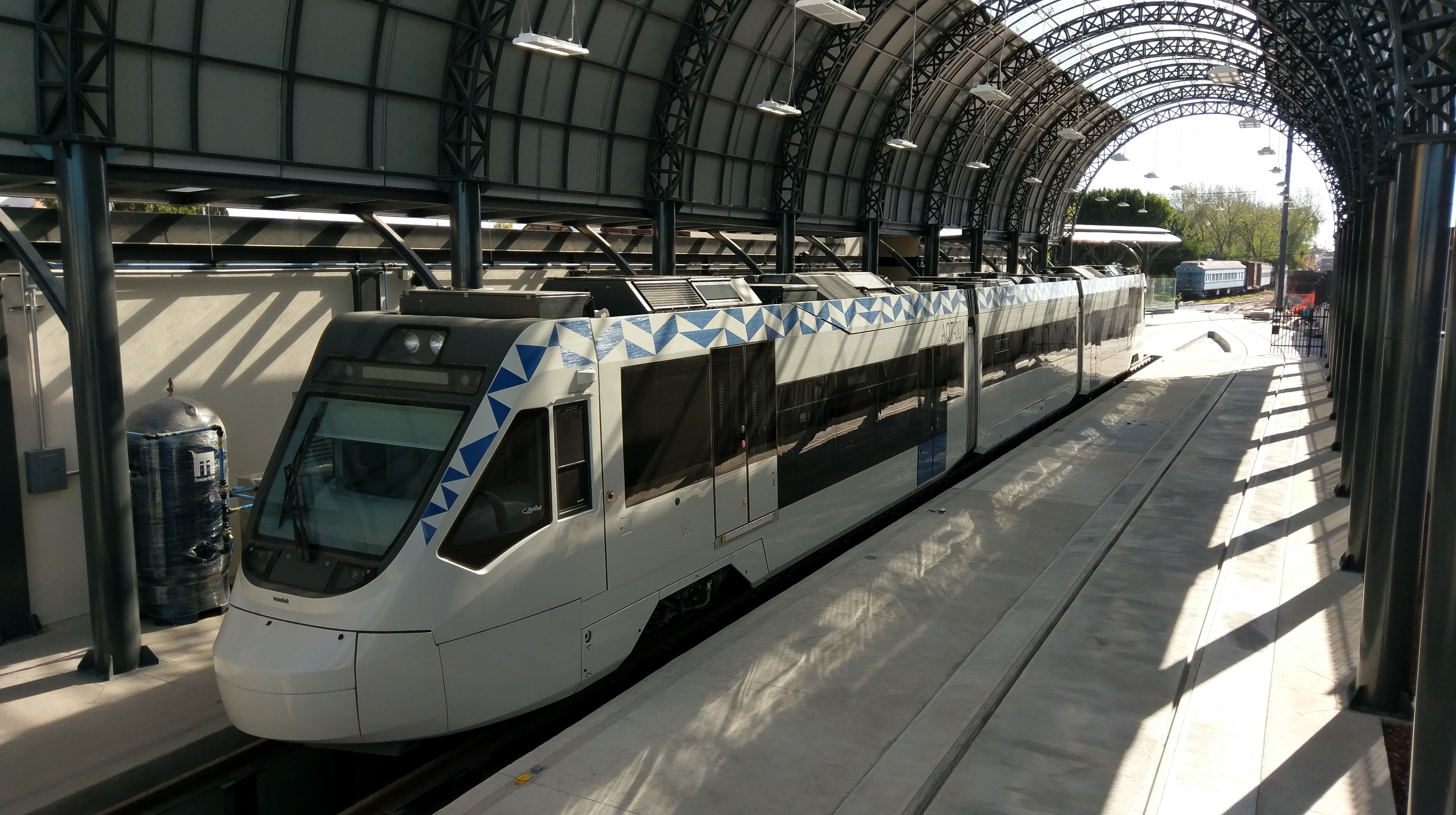 Esperando inauguración